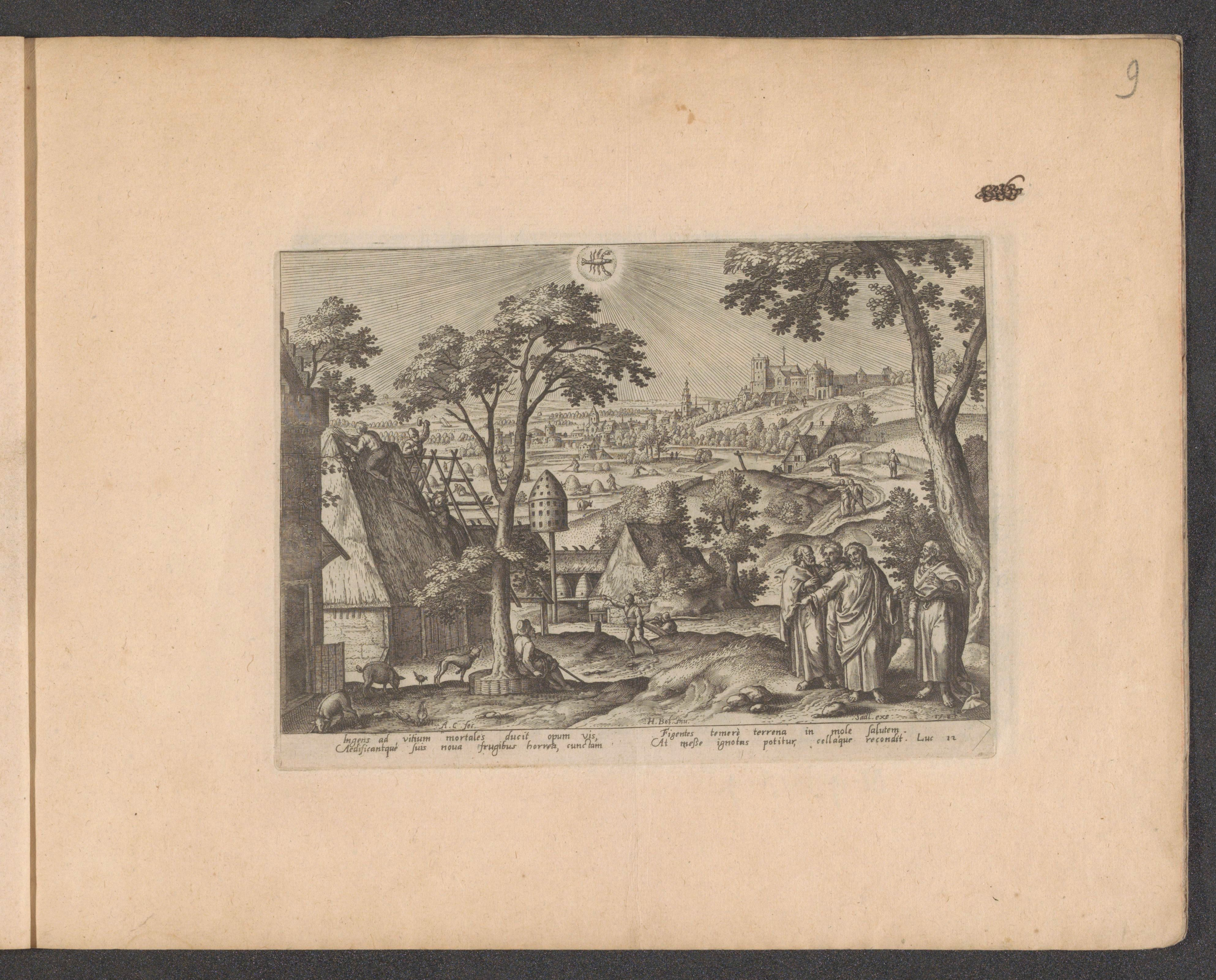 IdentificatieTitel(s): Juni: Christus leert de apostelen niet te veel Waar: de te hechten aan aardse goederenEmblemata Evangelica (serietitel)Objecttype: prent albumblad Objectnummer: BI-1933-176-9Catalogusreferentie: New Hollstein Dutch 231Opmerking: CollaertHollstein Dutch 94-108Opmerking: BolHollstein Dutch 511-522Opmerking: CollaertOmschrijving: Middenboven het teken van de dierenriem Kreeft. Op de voorgrond rechts staat Christus met drie apostelen die hij leert niet te veel waarde te hechten aan aardse goederen. Links een oude man, zittend onder een boom en een paar zwijnen voor een boerderij. Dakdekkers zijn bezig het rieten dak aan te leggen.VervaardigingVervaardiger: prentmaker: Adriaen Collaert (vermeld op object)naar ontwerp van: Hans Bol (vermeld op object)uitgever: Sadeler (vermeld op object)Plaats vervaardiging: AntwerpenDatering: 1585Fysieke kenmerken: gravureMateriaal: papier Techniek: graveren (drukprocedé)Afmetingen: plaatrand: h 153 mm × b 212 mmOnderwerpWat: do not lay up earthly treasures ~ doctrine of Christ on possessions (Matthew 6:19; Luke 12:21)roof-coveringdove-cotebee-hivelandscape symbolizing JuneCancer (zodiacal sign of June)Verwerving en rechtenVerwerving: aankoop 5-mei-1933Copyright: Publiek domein